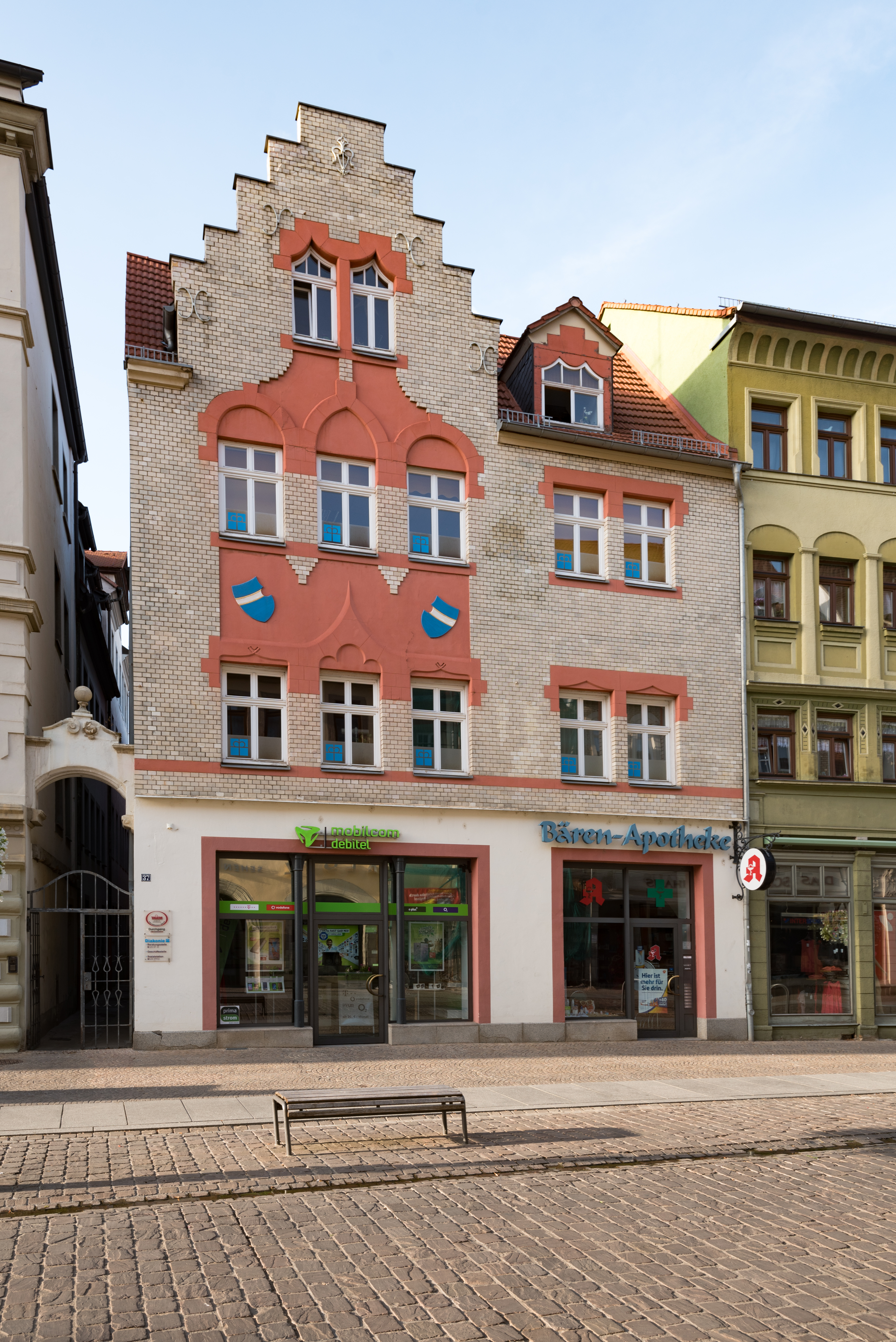 Naumburg (Saale), Jakobstraße 37